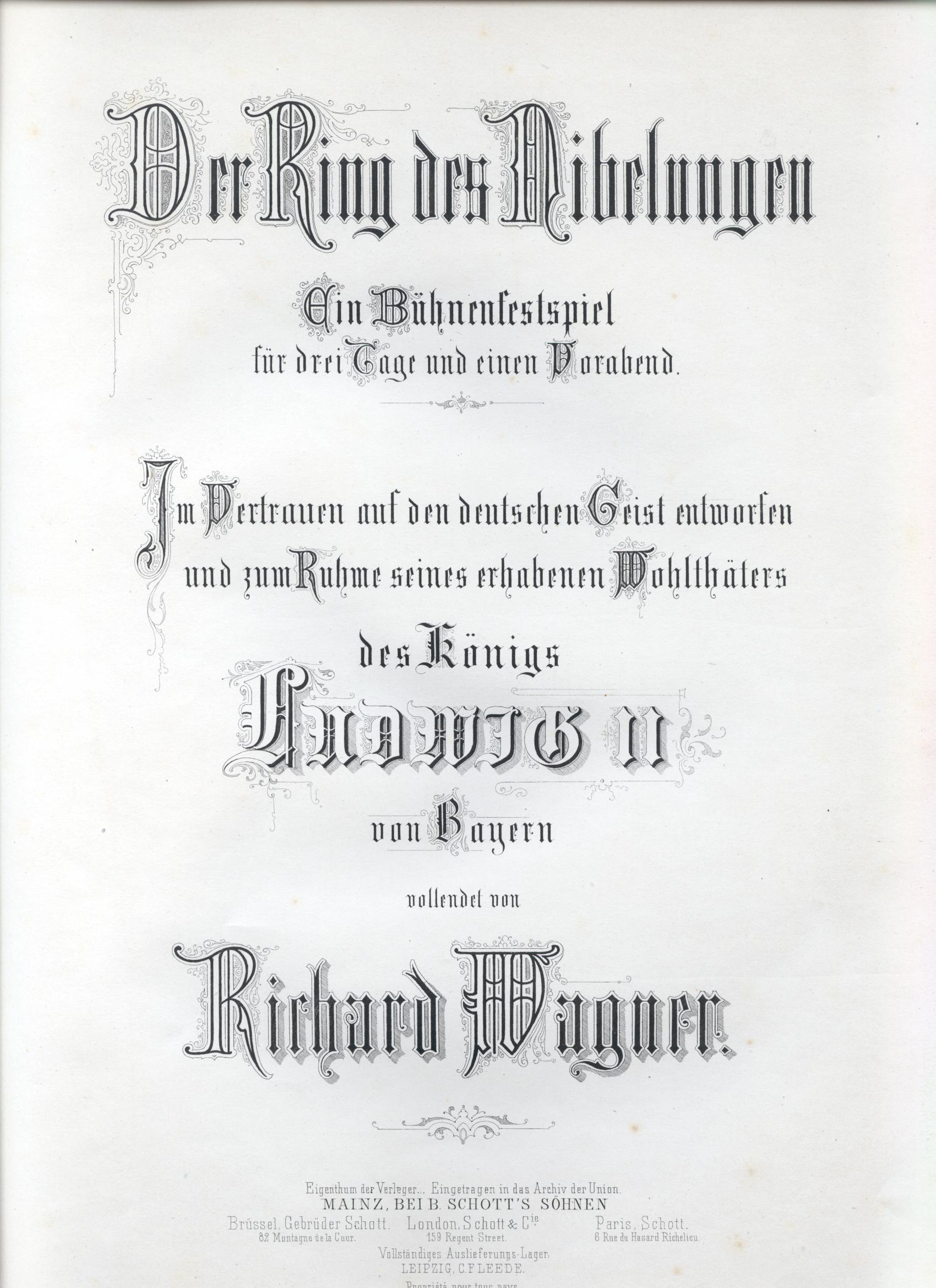 Portada del anillo de los Nibelungos.